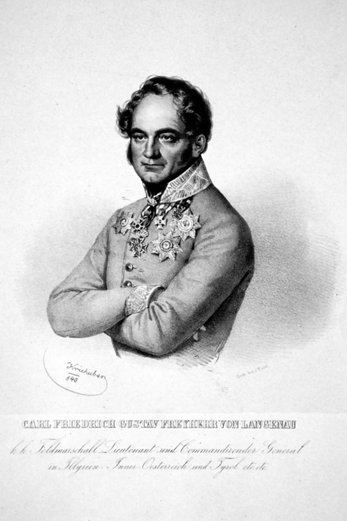 Karl Friedrich Gustav Freiherr von Langenau (1782-1840), k. k. Feldmarschallleutnant, Geheimrat, kommandierender General in Illyrien, Inner- Österreich und Tirol. Lithographie von Josef Kriehuber, 1840